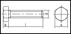 ISO 8676